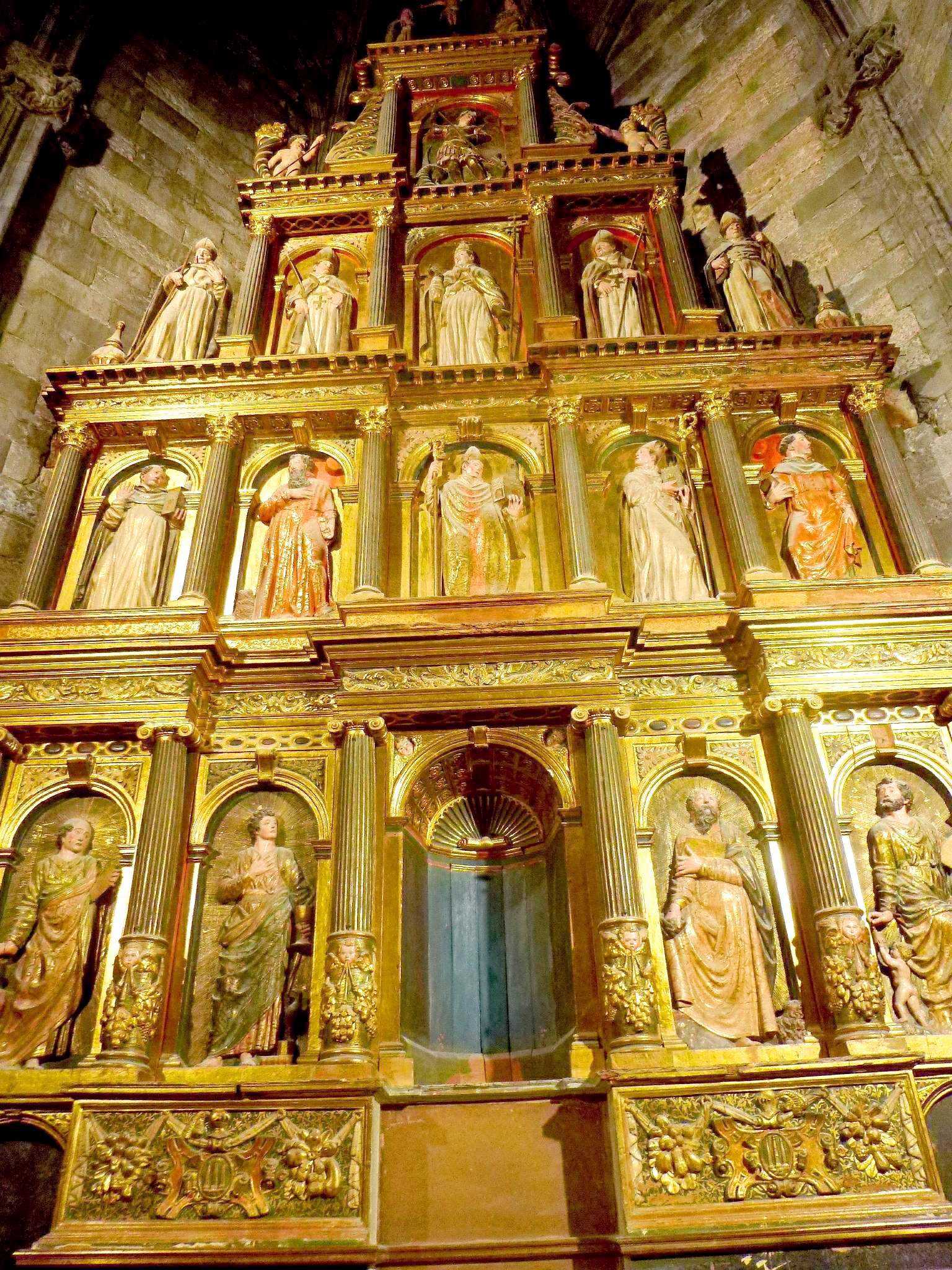 Girona - Catedral, Capilla de los Santos Doctores de la Iglesia